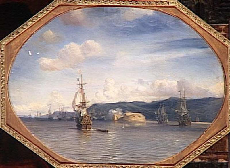 Prise de Messine - 11 février 1675, huile sur toile de Théodore Gudin. 2e quart 19e siècle. Lieu de conservation Versailles ; hôtel de la préfecture des Yvelines